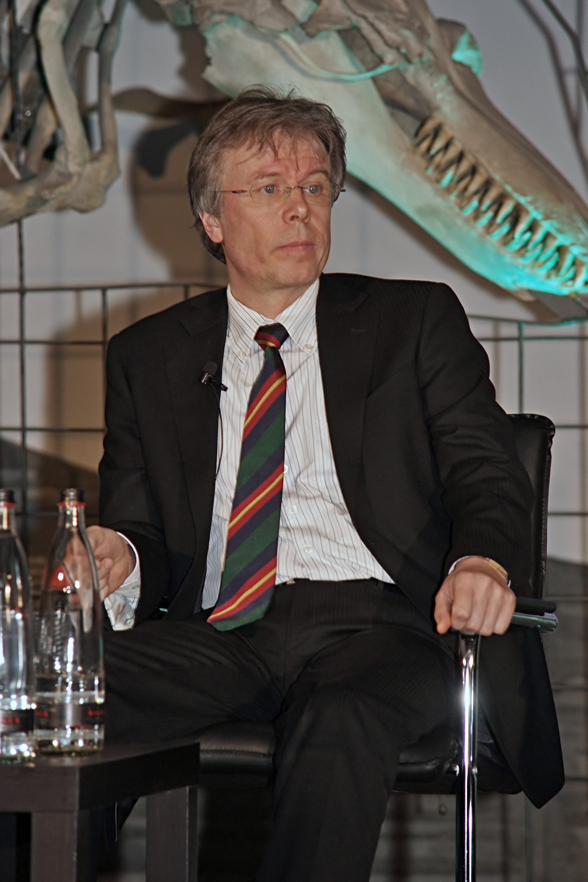 Verleihung der Zedler-Medaille 2009 im Naturmuseum Senckenberg in Frankfurt am Main Wolfgang Peukert